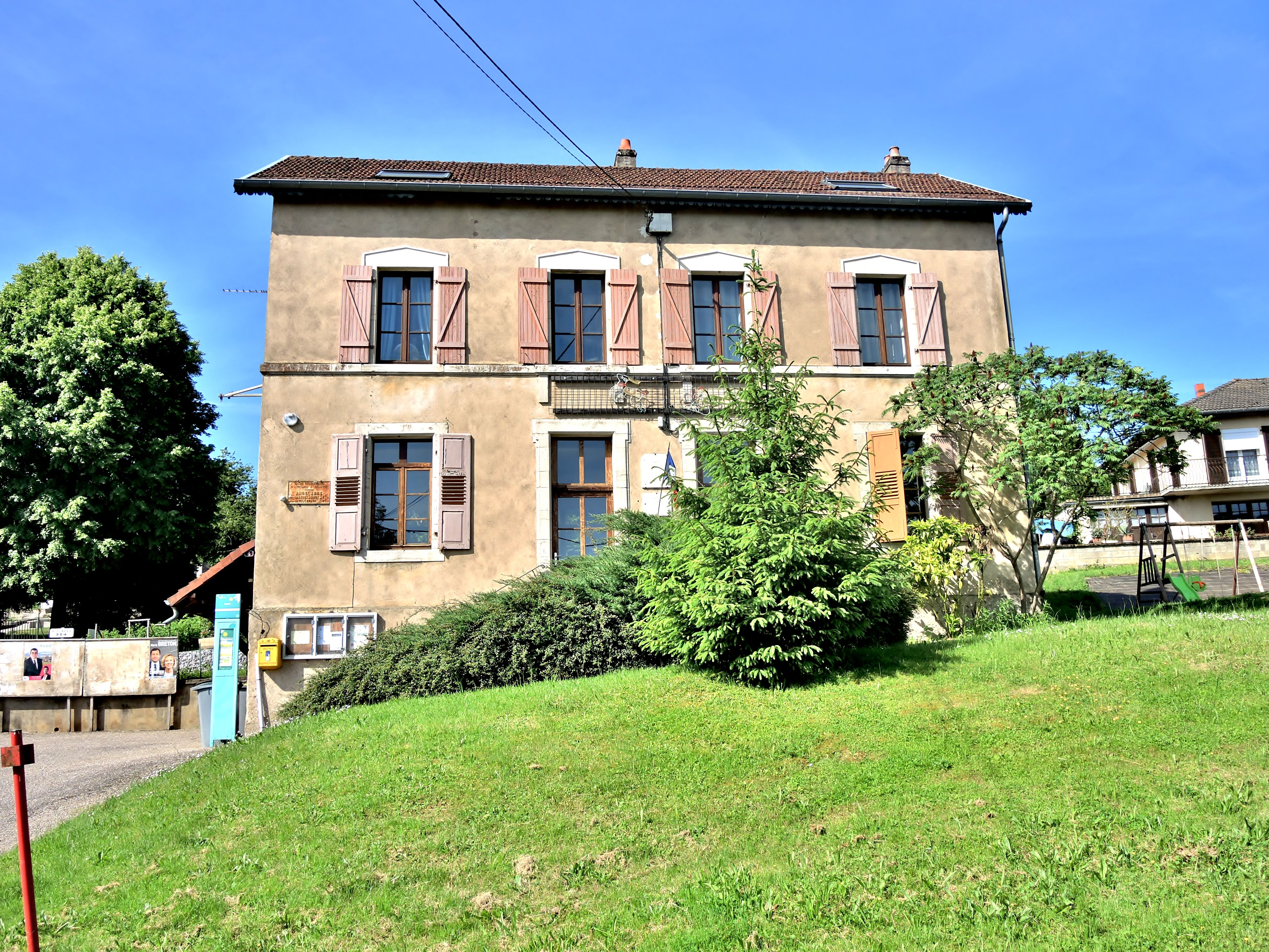 Façade de la mairie d'Andelarre. Haute-Saône